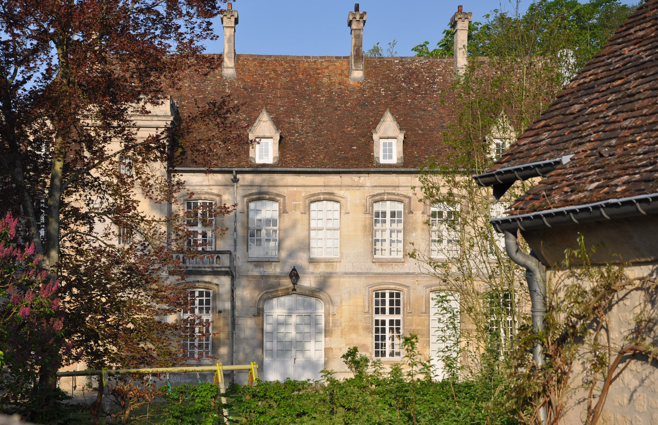 Château de Rethondes